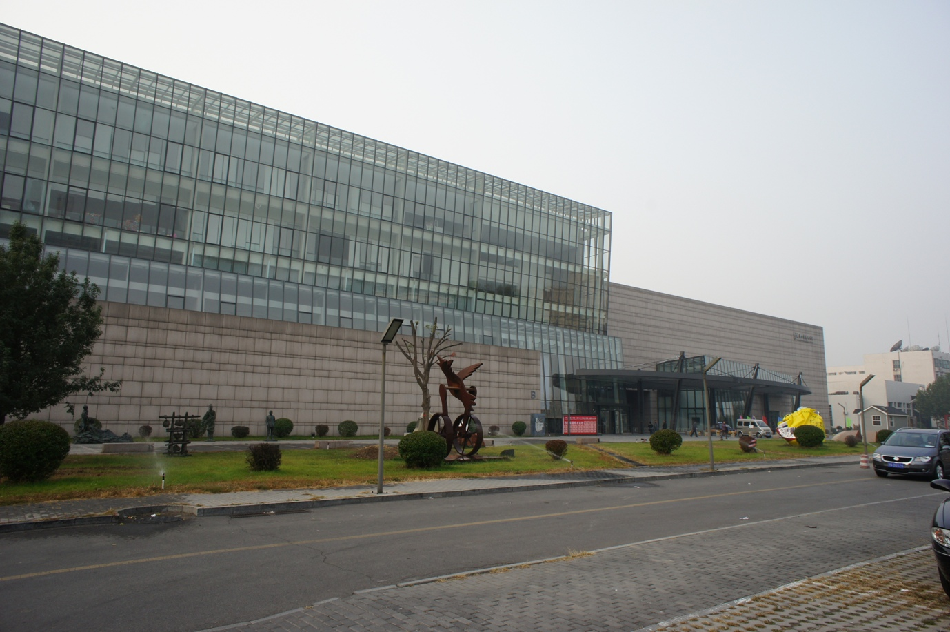 中文（中国大陆）: 清华美院